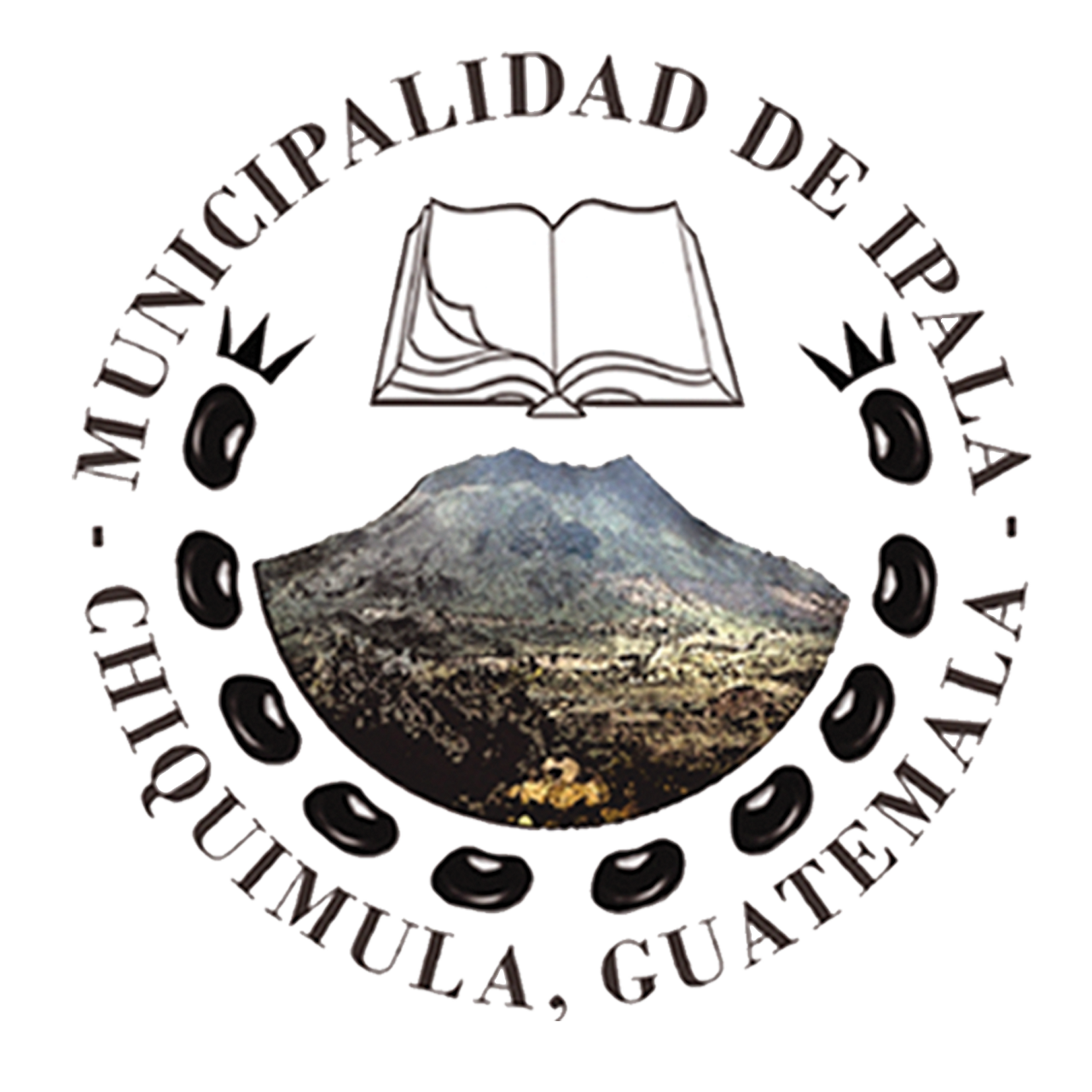 ELEMENTOS DEL ESCUDO DE IPALA • El volcán, • Frijoles color negro, en forma de ramas de laurel • Libro abierto (en representación de la cultura)